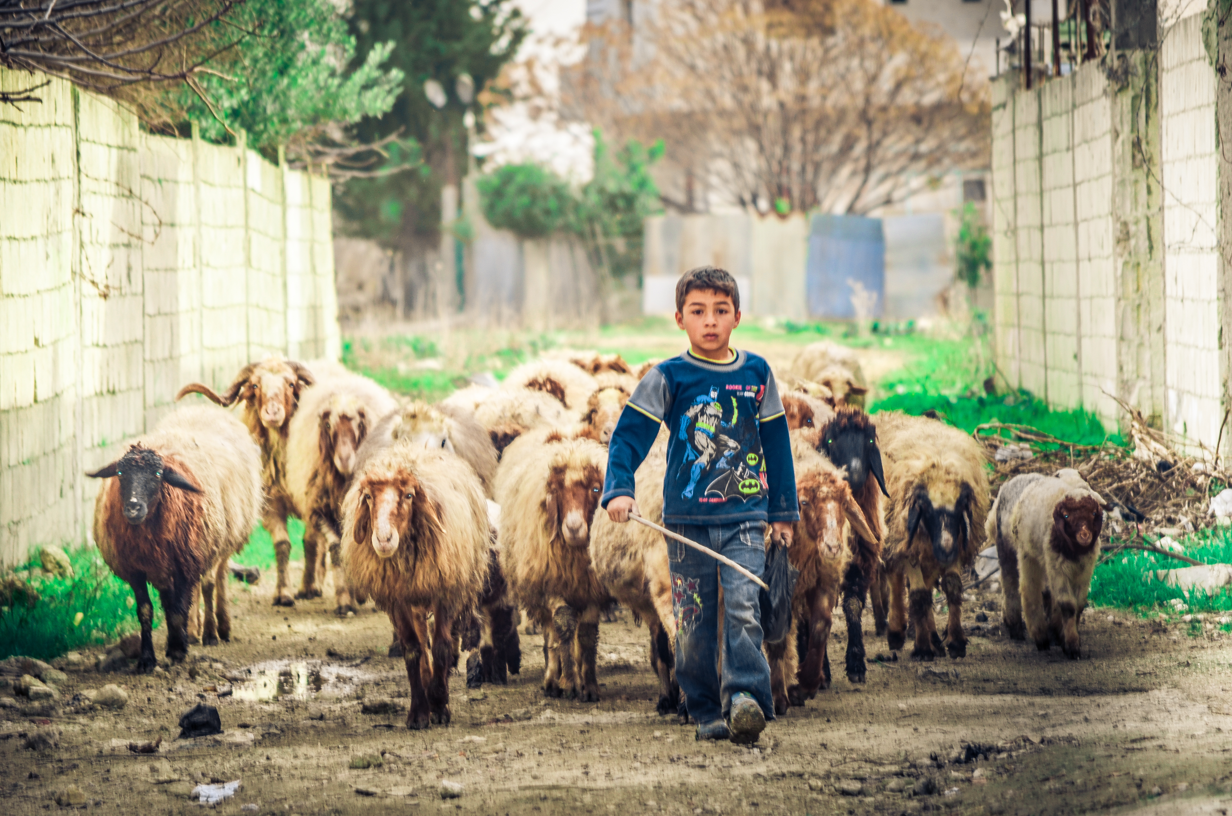 Jableh (Arabic: جبلة Ǧabla), also spelt Jebleh, Jabala, Jablah or Gabala, is a coastal city on the Mediterranean in Syria.[1] with c. 80,000 inhabitants (2008). Jableh was part of the Principality of Antioch, one of the Crusader States, until it was captured by Saladin in 1189 during the Third Crusade. One famous resident was Hugh of Jabala, the city's bishop, who reported the fall of Edessa to Pope Eugene III, and was the first person to speak of Prester John. The city is home to the tomb and the mosque of Sultan Ibrahim Bin Adham, a famous Sufi mystic who renounced his throne and devoted himself to prayers for the rest of his life.[2] Jableh has a beach named in the local language (Al-Kurnish), where people come and meet to enjoy the cold beer and water pipe in that incredible view of the sea. Jableh is the home town of the Syrian pioneer of modern Arabic poetry Adunis who was one of the first Arabic poets. Jableh is also the home town of the world-champion swimmer Firas Mouala, who swam from Latakia to Cyprus (almost 90 km distance): . The city is the home town of Izz ad-Din al-Qassam, a famous Islamic figure who fought against the French Colonization in Syria, and then moved to Palestine where he led a revolution against the British authorities and the well-armed Jewish gangs. In antiquity Jableh was an important Roman city, one of the main remains of this period is an amphitheatre, capable of housing c. 7,000 spectators. Near the seashores even older remains were found dating to the Iron Age or Phoenician Era. Less than 1 kilometer of the city centre lies the ancient site of Gibala, today known as Tell Tweini. This city was inhabited from the third millennium BCE until the Persian period